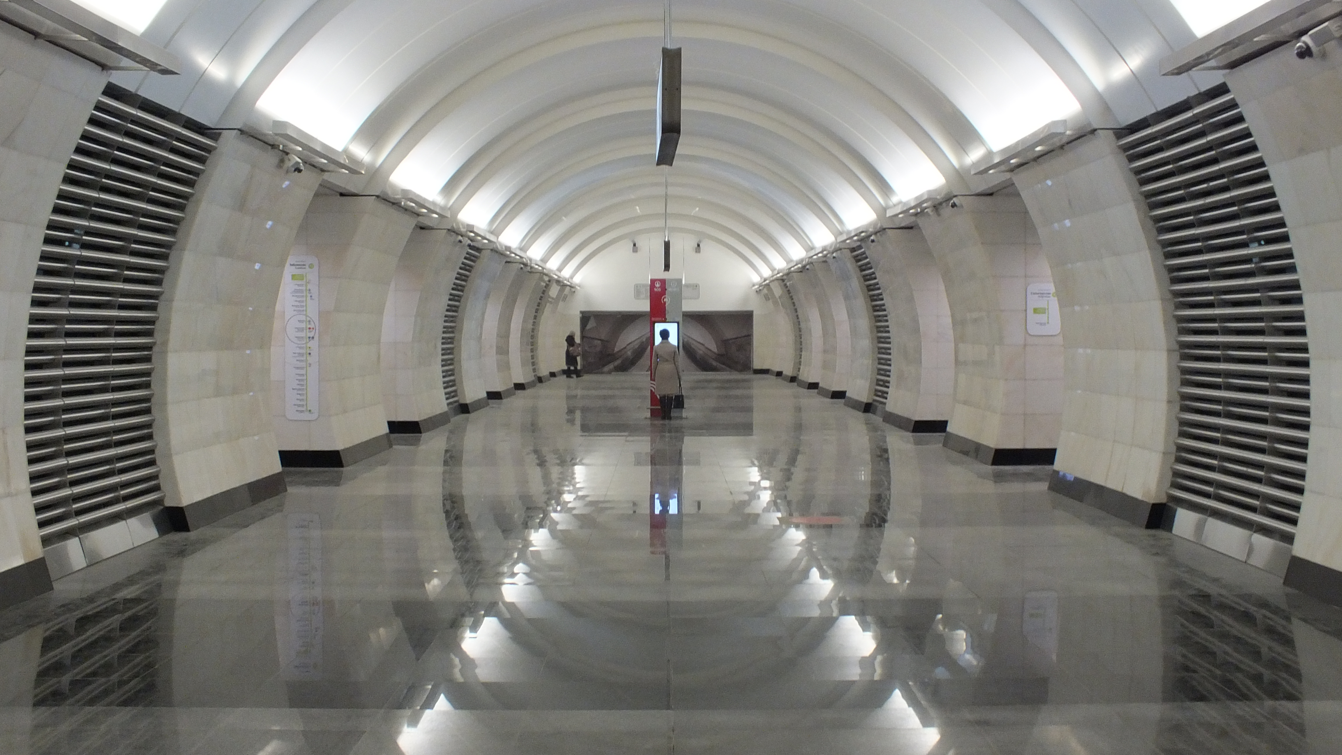 Станции метро «Верхние Лихоборы», центральный зал станции. Вид в сторону неоткрытого выхода в город.